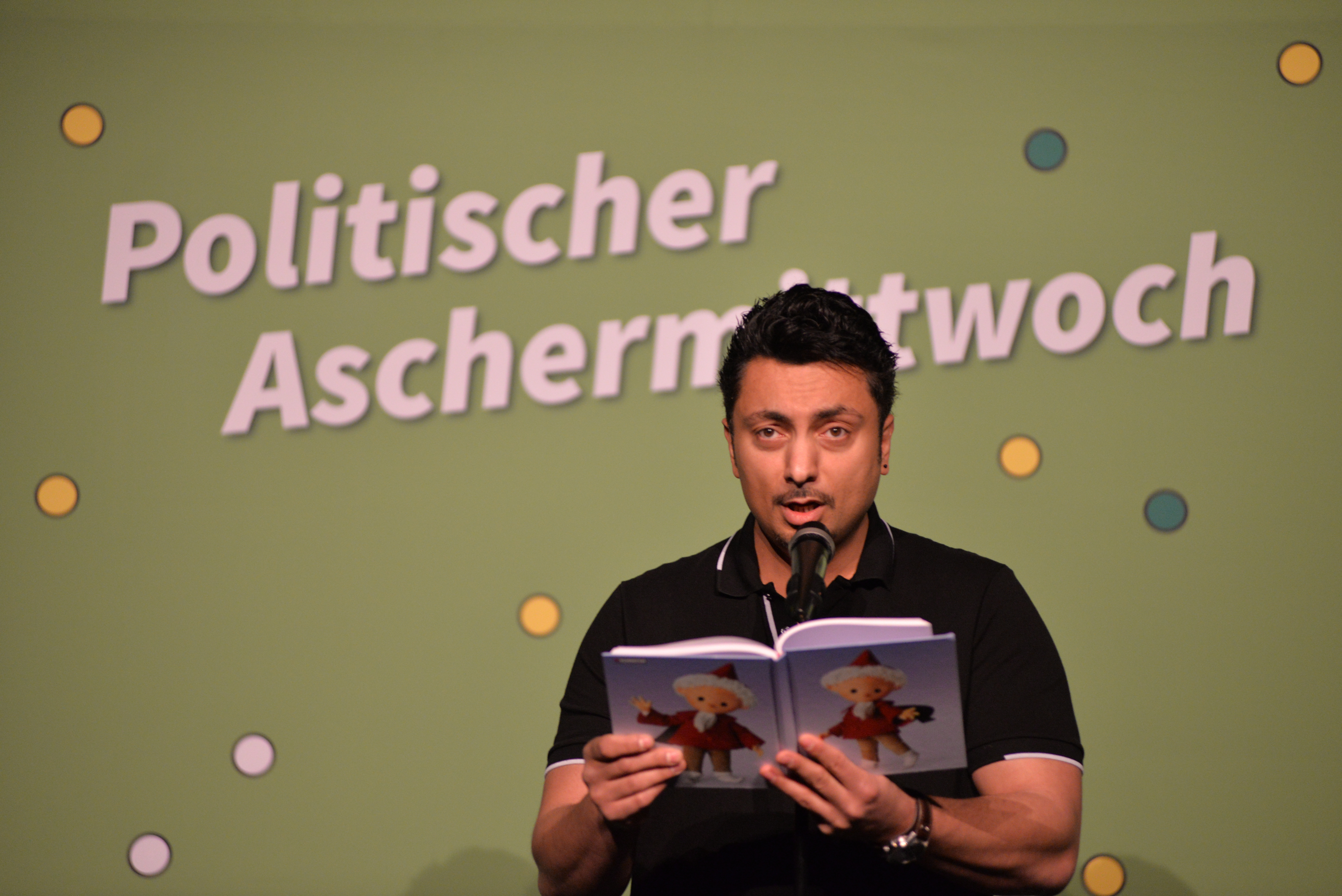 Jeck auf GRÜN: Politischer Aschermittwoch 2014